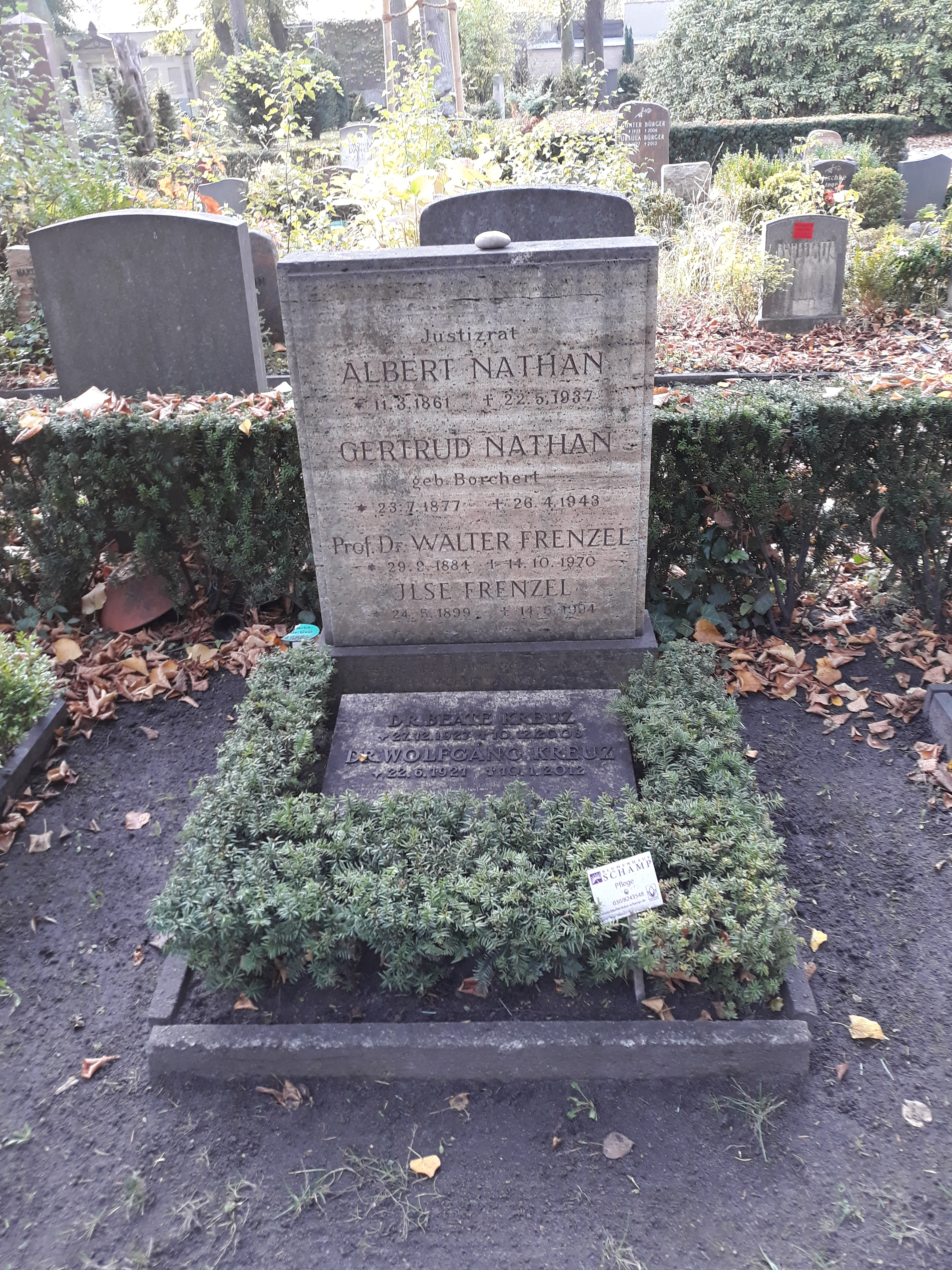 Das Familiengrab des deutschen Textilwissenschaftlers Walter Frenzel auf dem Friedhof Wilmersdorf in Berlin.